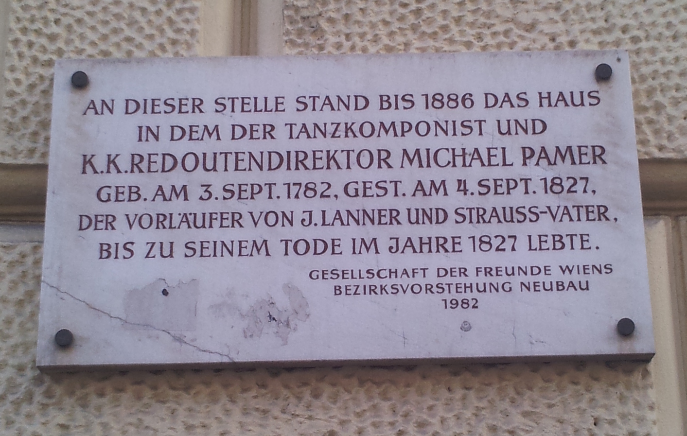 Gedenktafel des Österreichischen Komponisten Michael Pamer, in der Neustiftgasse 5